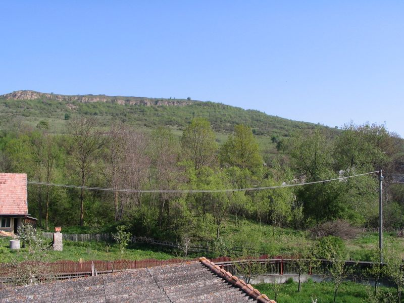 Telekfalvi barlangok (Somoserdő), Hargita megye, Erdély